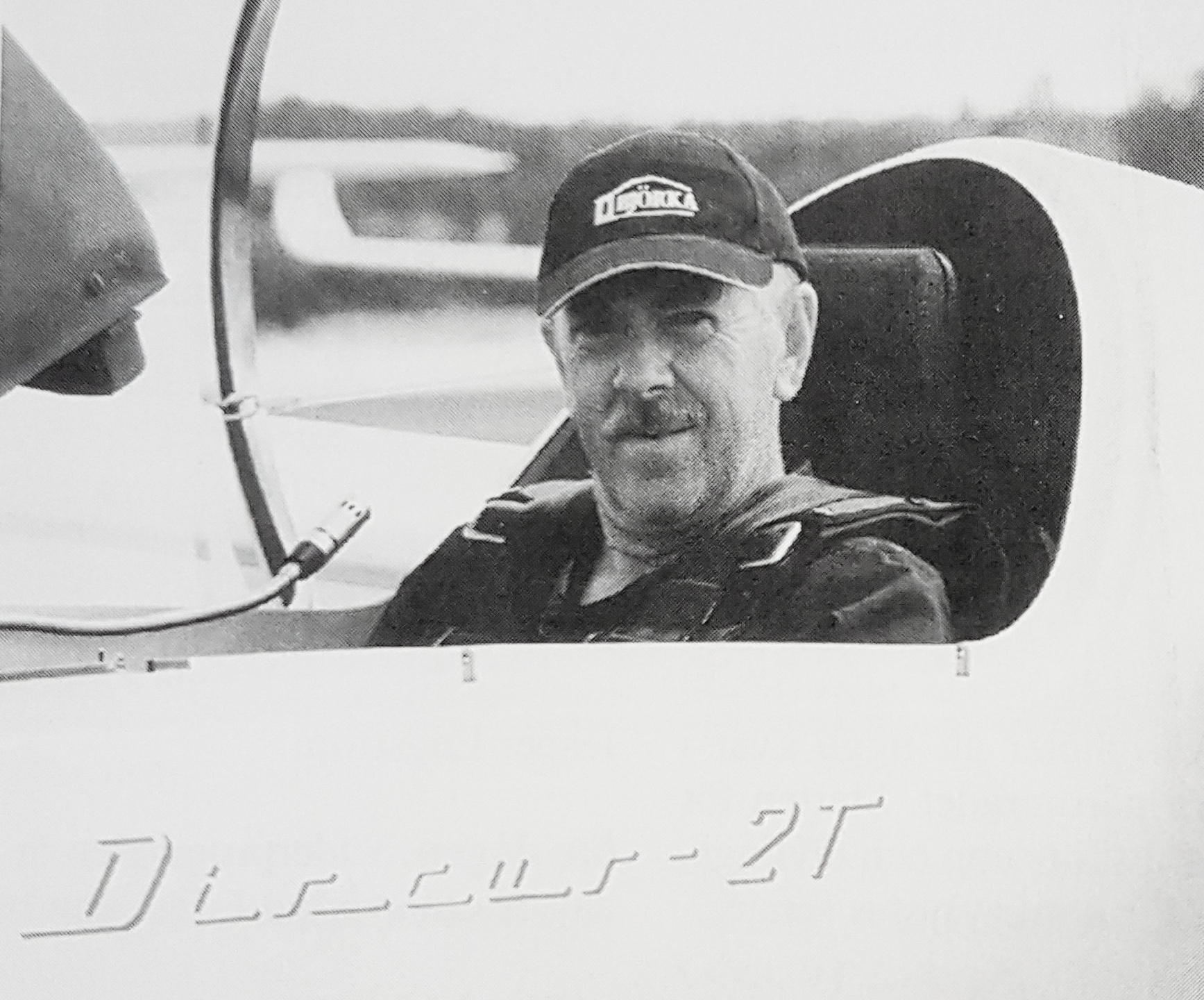 Bengt Göök i en Discus 2T